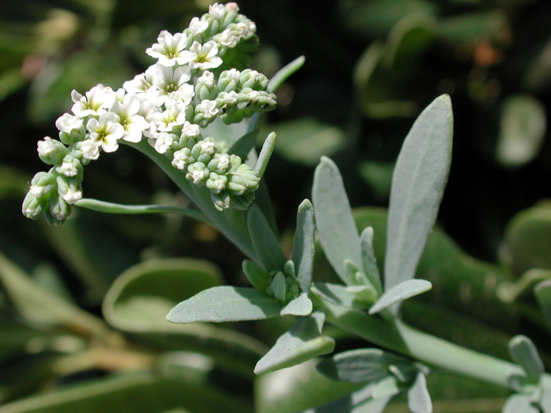 Heliotropium curassavicum, Maricopa Co., Arizona, USA